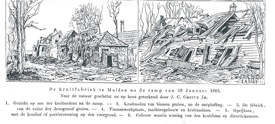 Links: Gezicht op een der kruitmolens na de ramp. Rechts: Kruitmolen van binnen gezien, na de ontploffing. Naar de natuur geschetst en op hout getekend.